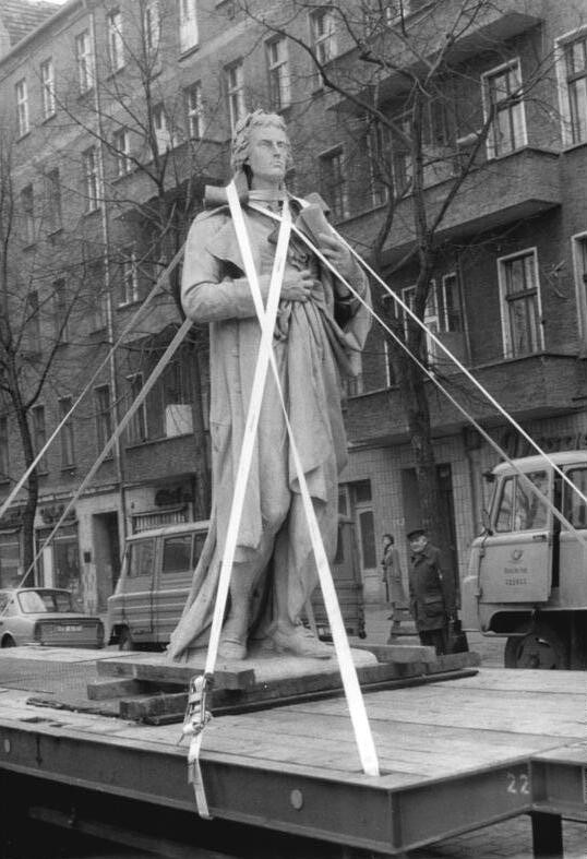 ADN-ZB Reiche-3.4.86-Berlin:Kulturgüter/ Die Rückführung des Standbildes Friedrich Schillers aus Westberlin in die DDR-Hauptstadt. Das von Reinhold Begas in der zweiten Hälfte des 19. Jahrhunderts geschaffene Denkmal wird an seinen ursprünglichen Standort vor dem Schauspielhaus wieder aufgestellt werden. Das Foto zeigt das Standbild beim Transport in der Elsenstraße im Stadtbezirk Berlin-Treptow